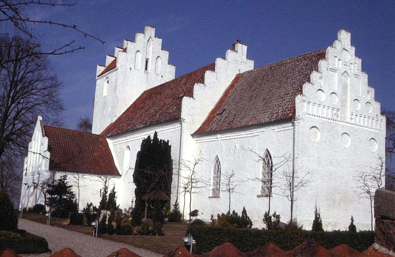 Fodby Kirke i Danmark. Fodby kirke